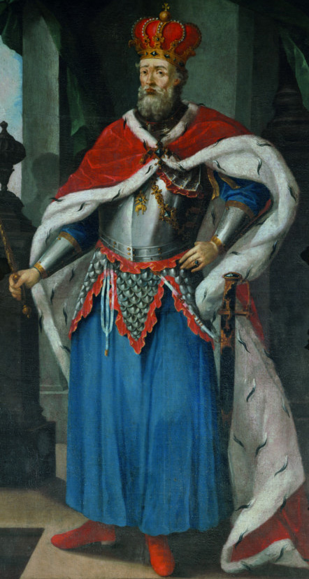 Беларуская (тарашкевіца): Партрэт караля польскага і вялікага князя літоўскага Аляксандра